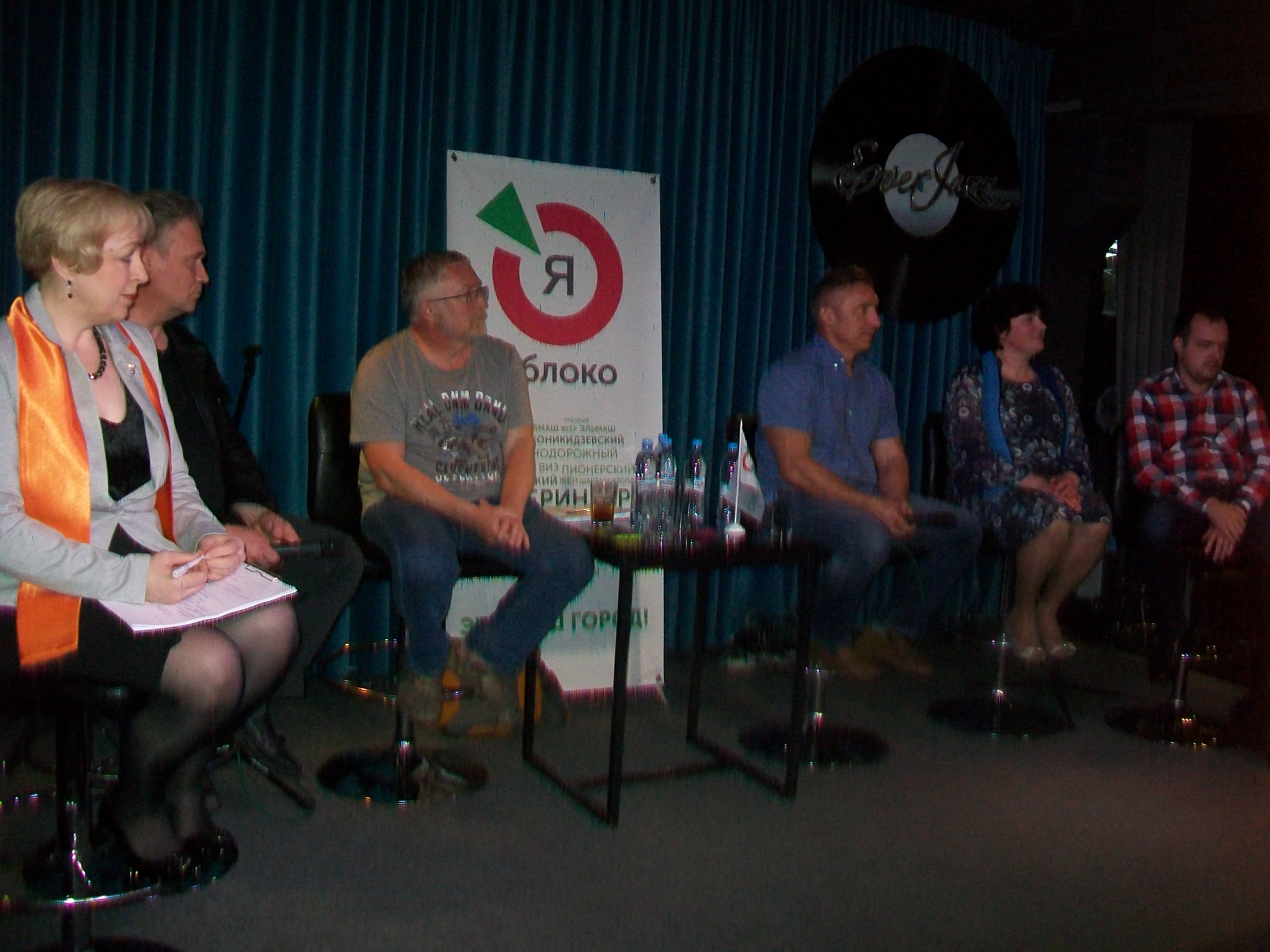 Праймериз-дебаты партии Яблоко в Екатеринбурге. 13 июня 2018 года